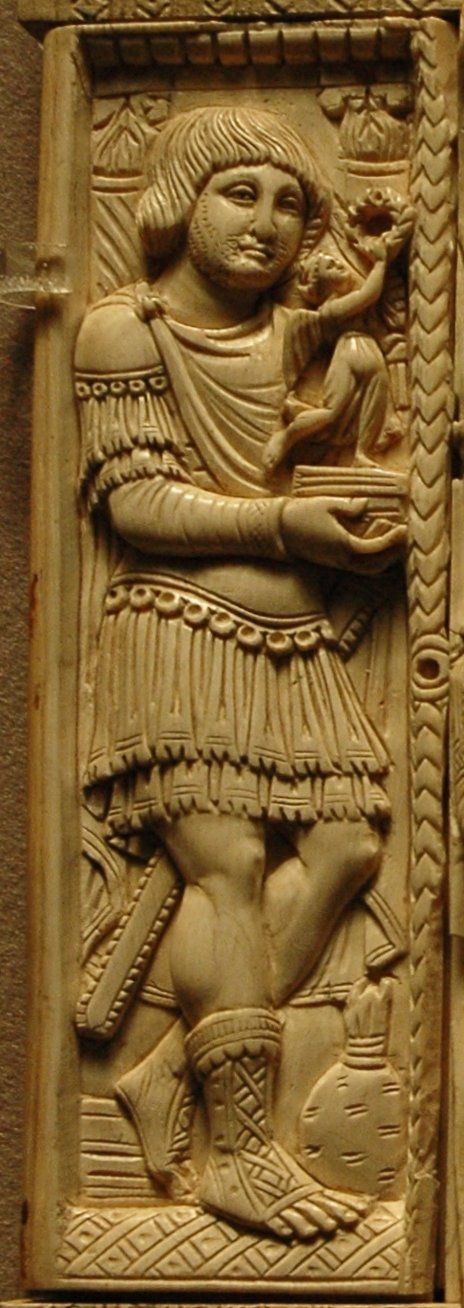 Pannello sinistro dell'Avorio Barberini Left panel of the Barberini ivory